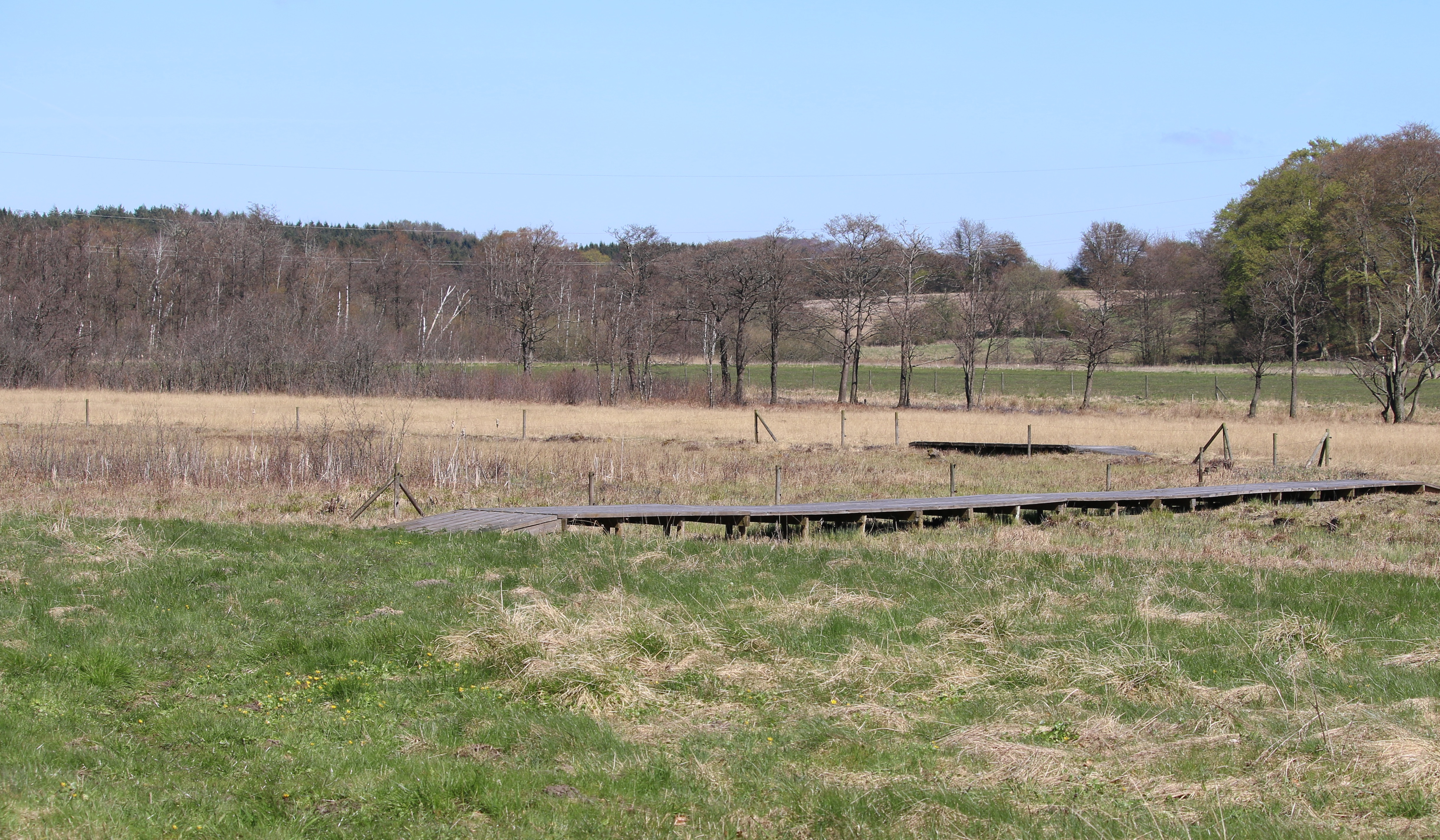 Hunneröds mosse